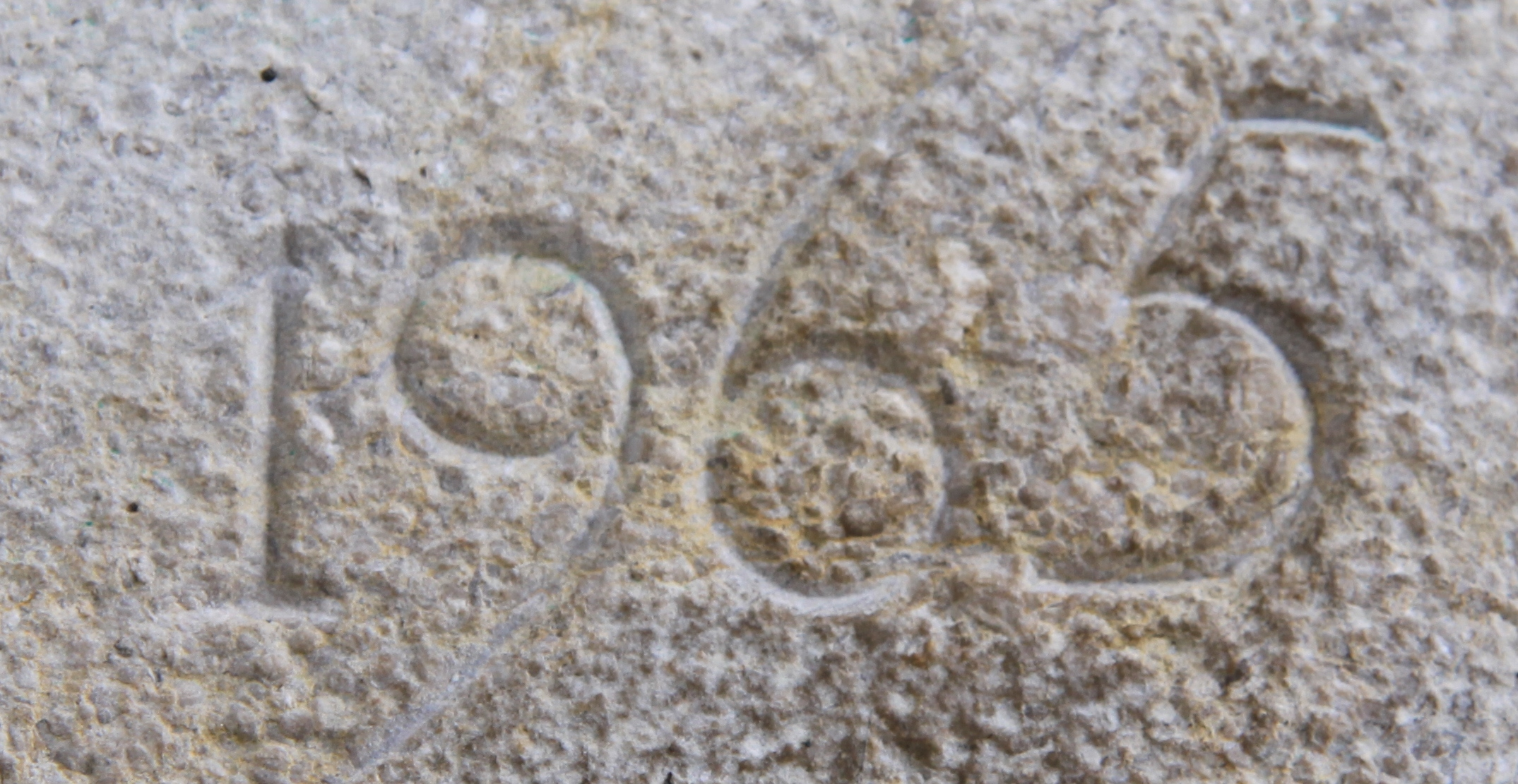 Fragment de la placa penjada en el Pont Vell de Besalú amb motiu de la finalització de la seva restauració l'any 1965